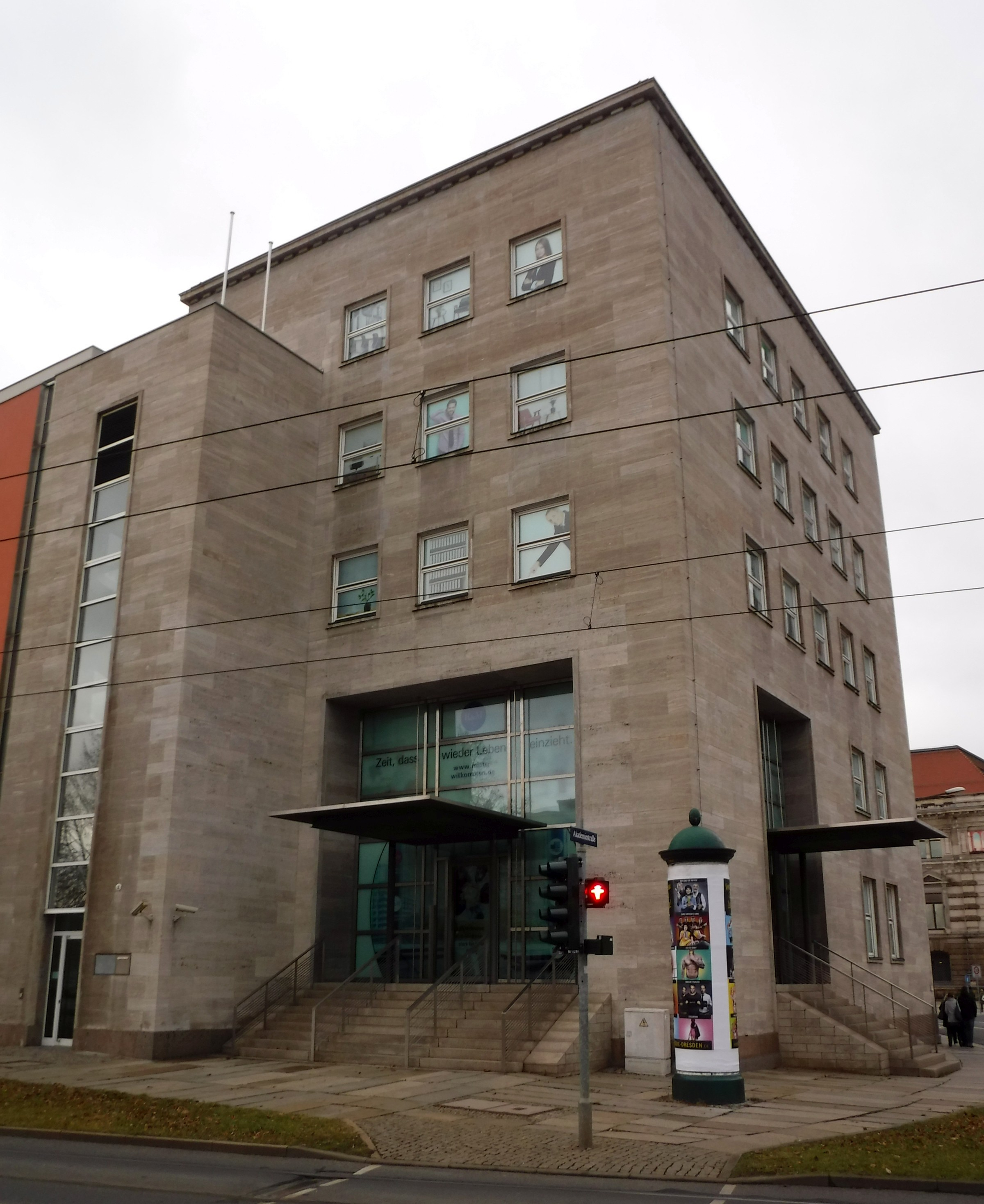 Gebäude der ehemaligen Reichsbank Dresden nach dem Umbau zum Bürohaus (vor der Neuvermietung)